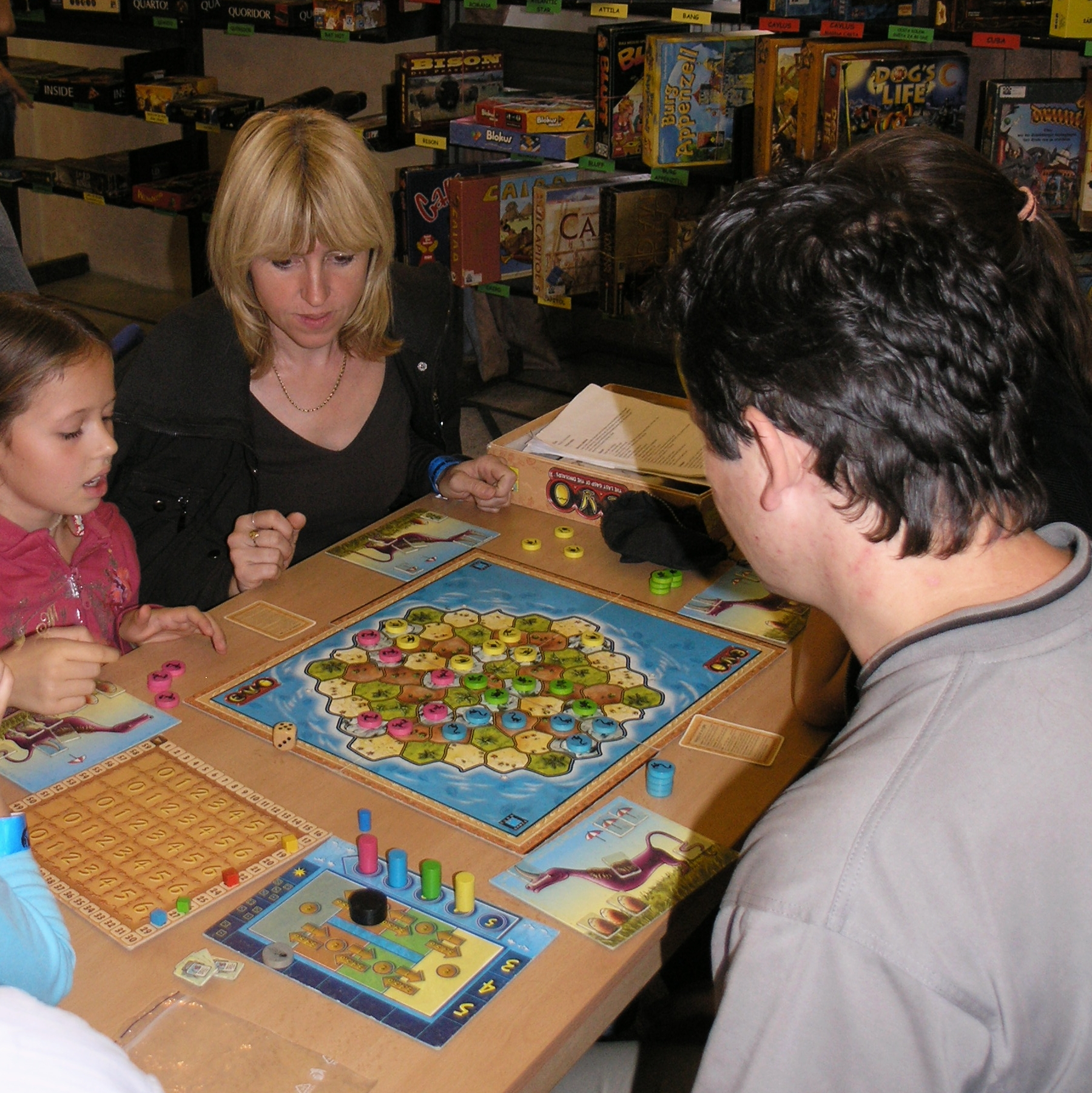 Deskohraní 2008